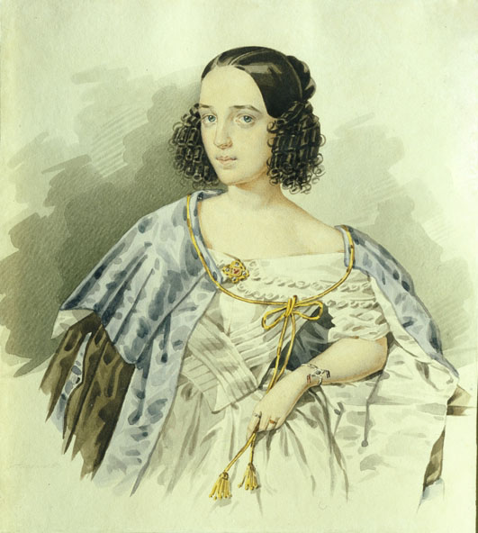 Актриса Варвара Николаевна Асенкова (1817-1841)